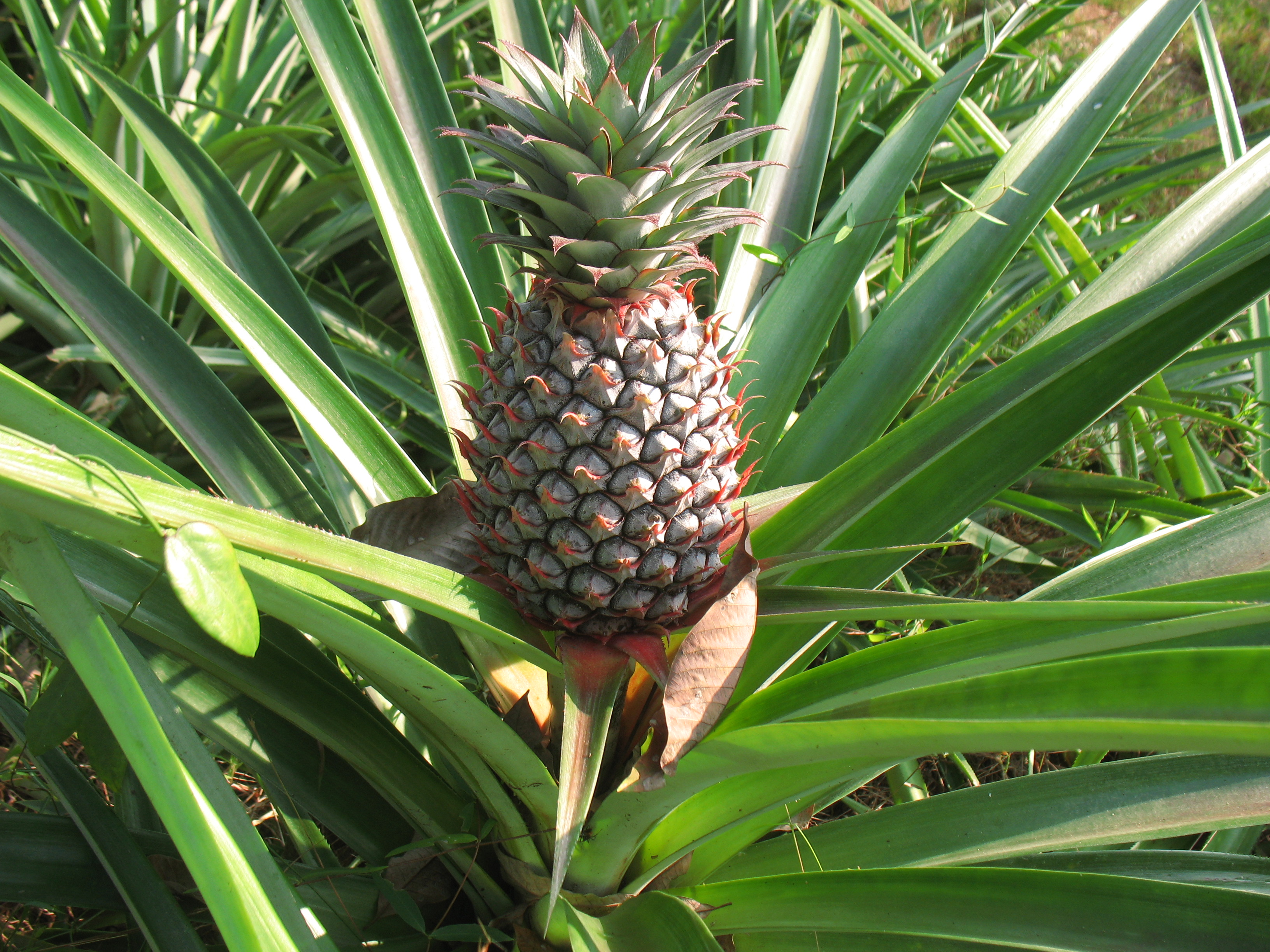 കൈതയും അതിൽ നിൽക്കുന്ന ചക്കയും